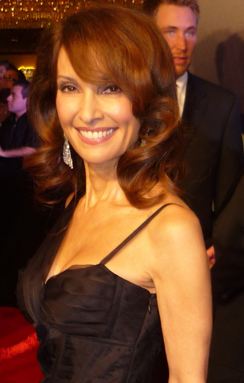 susan lucci en 2010